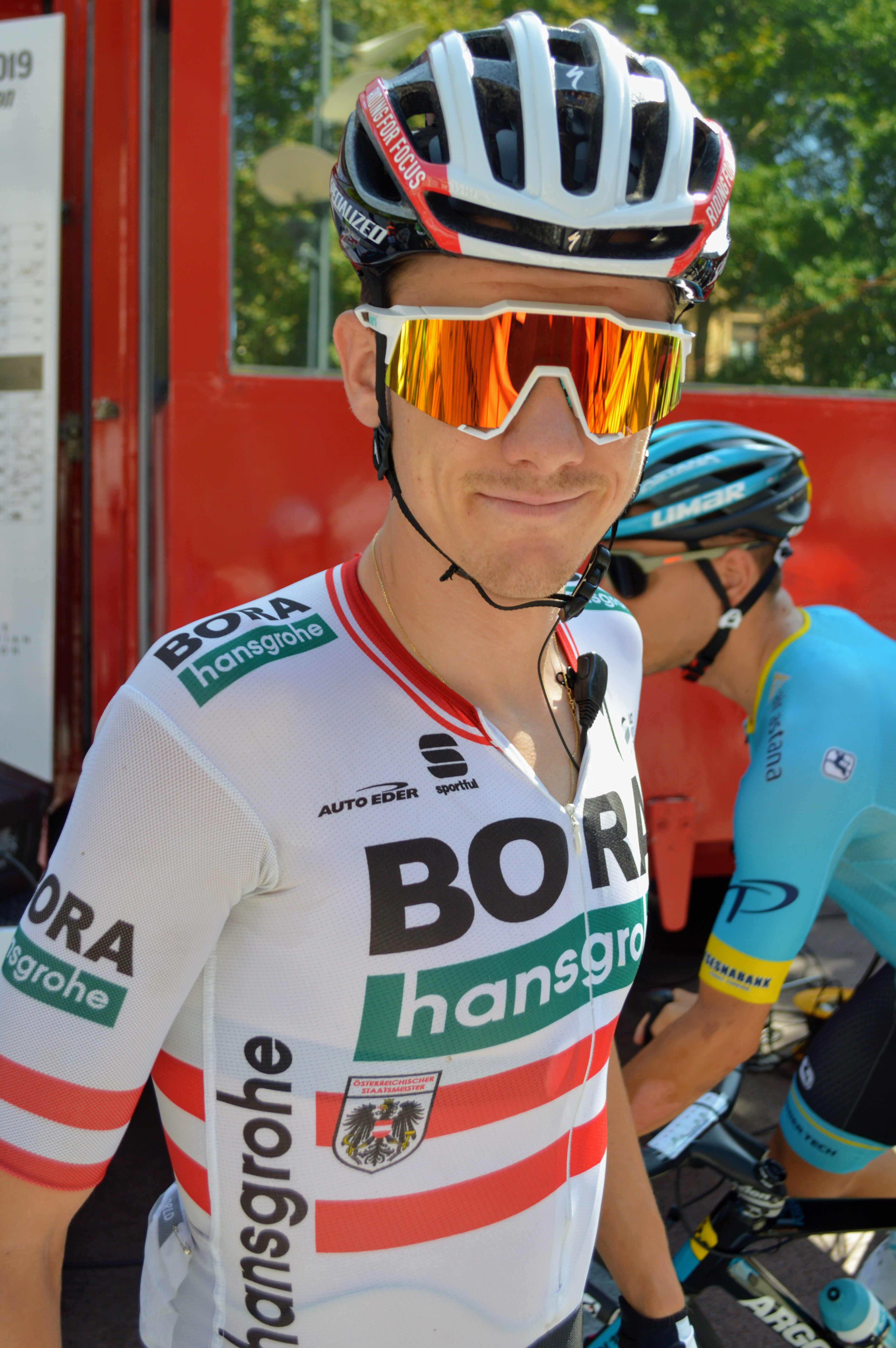 Patrick KONRAD - Août 2019 (Clasica San Sebastian)